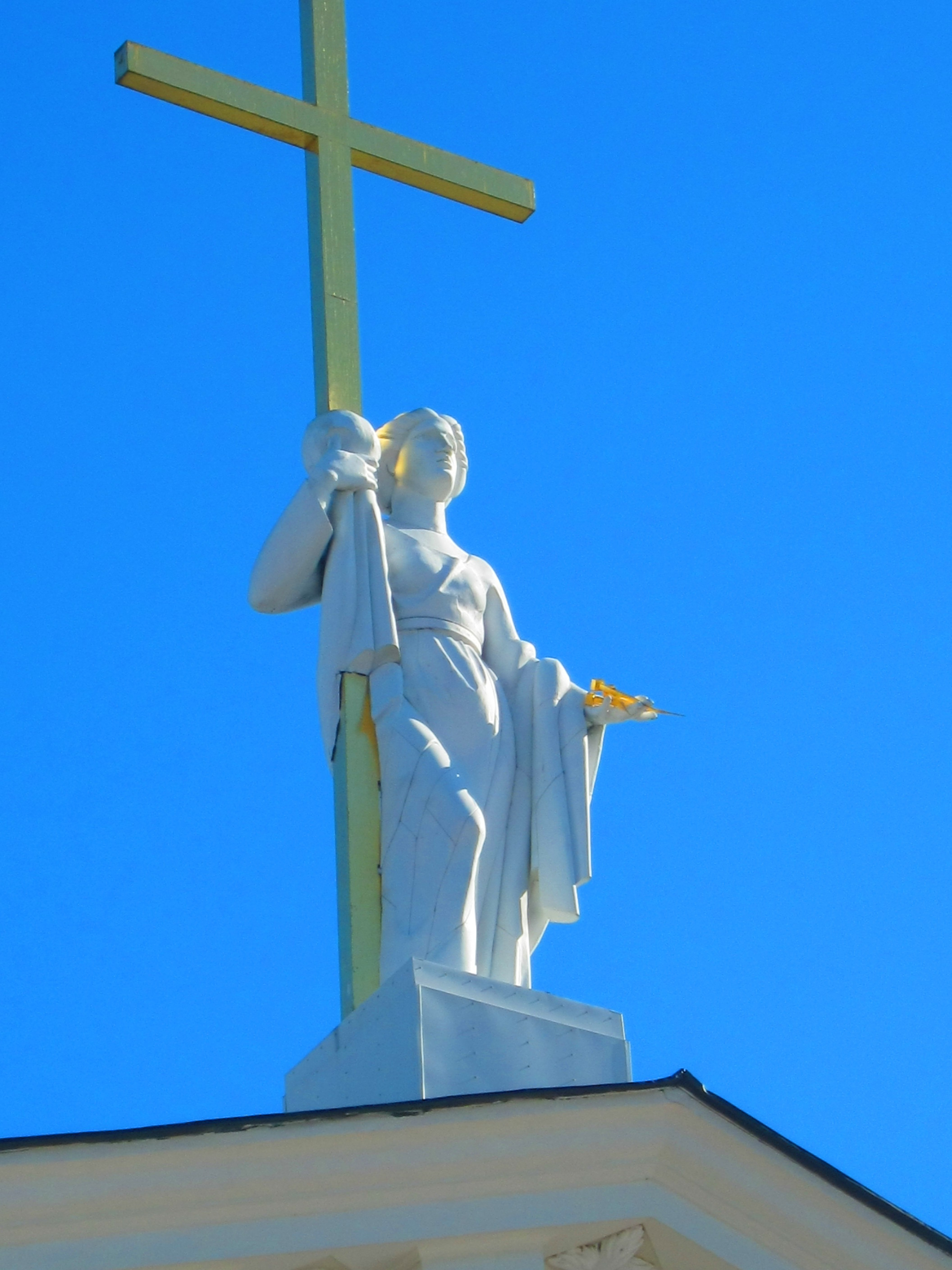 Vilniaus arkikatedra